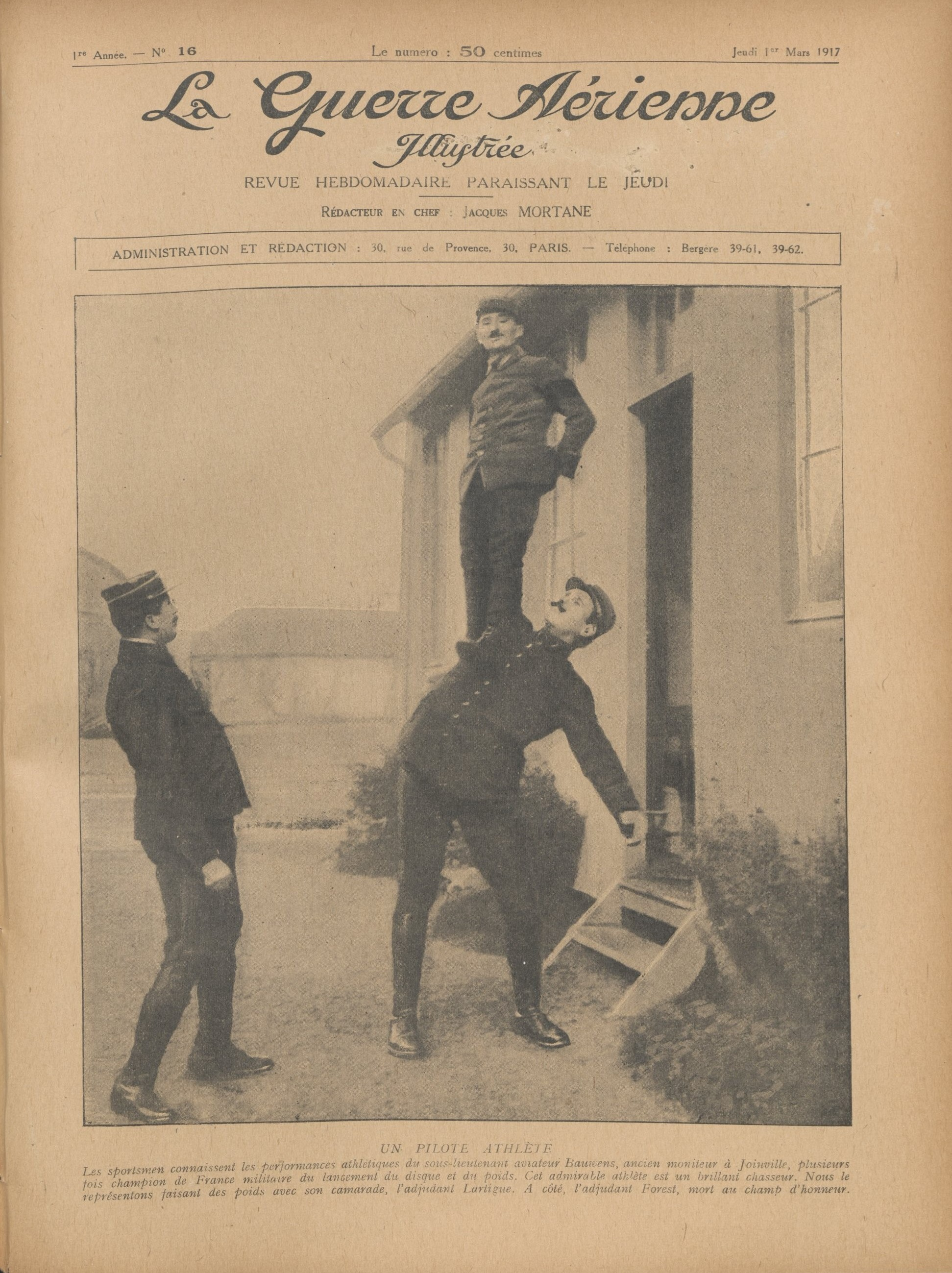 Le sous-lieutenant aviateur Maurice Bauwens, athlète accompli, ancien moniteur à Joinville, ancien champion de France militaire de lancement du disque et du poids, fait du poids avec son camarade l'adjudant Lartigue.